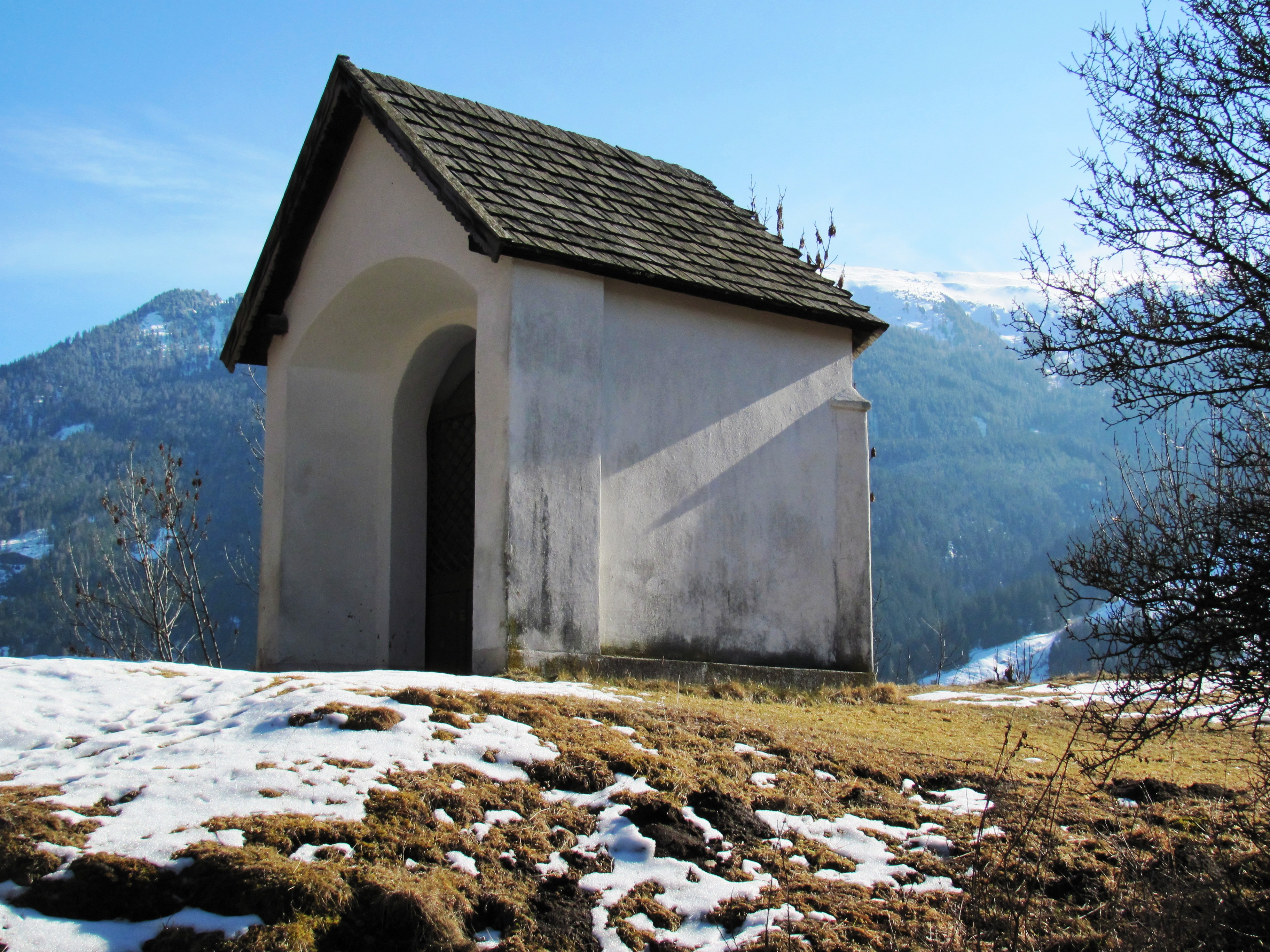 zwischen Fließ Dorf und Eichholz an der Via Claudia Augusta, Gemeinde Fliess